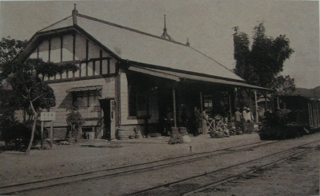 旗山車站 (蕃薯藔停車場)